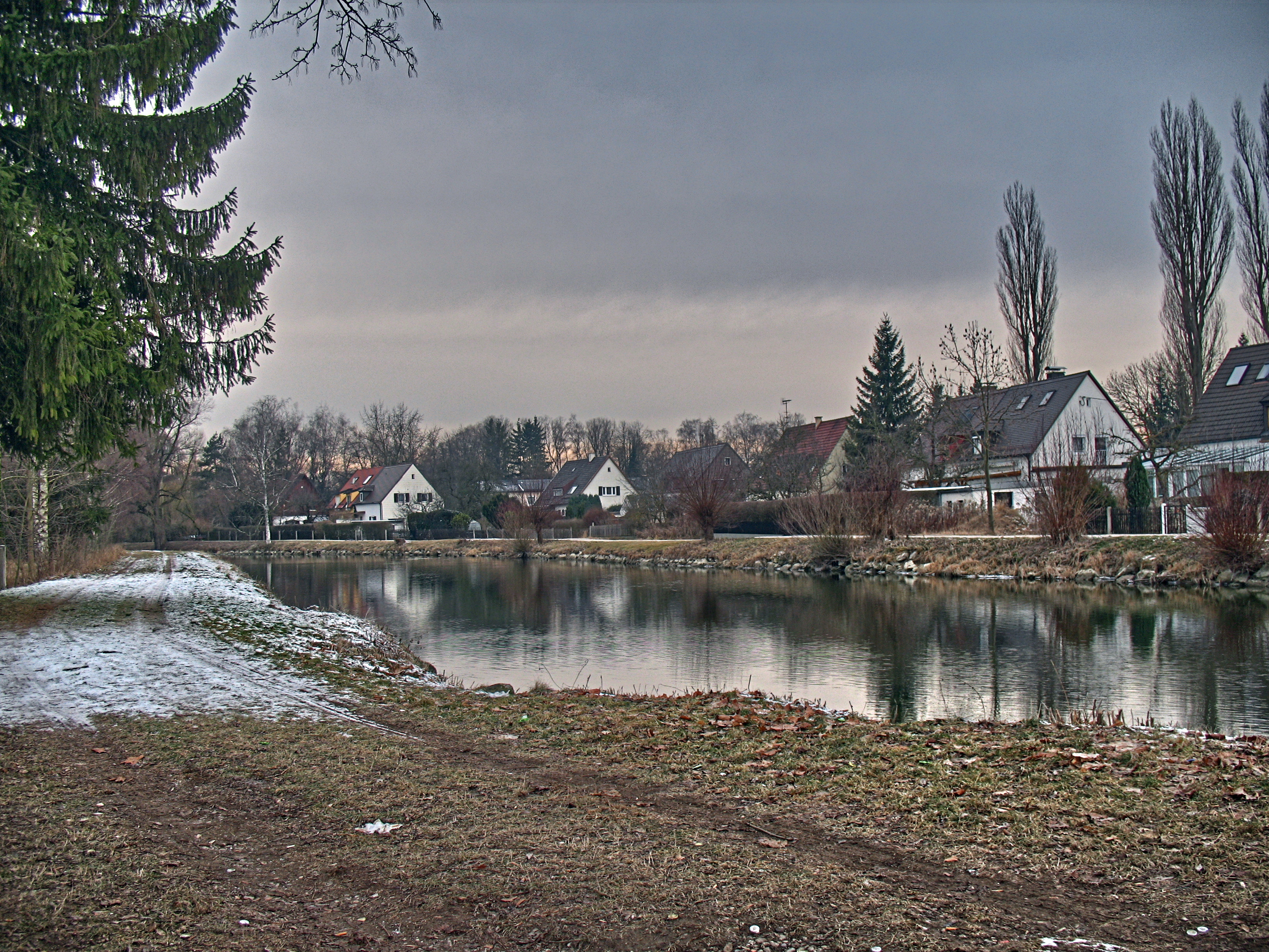 Deutschland, Bayern, Fürstenfeldbruck, Amper